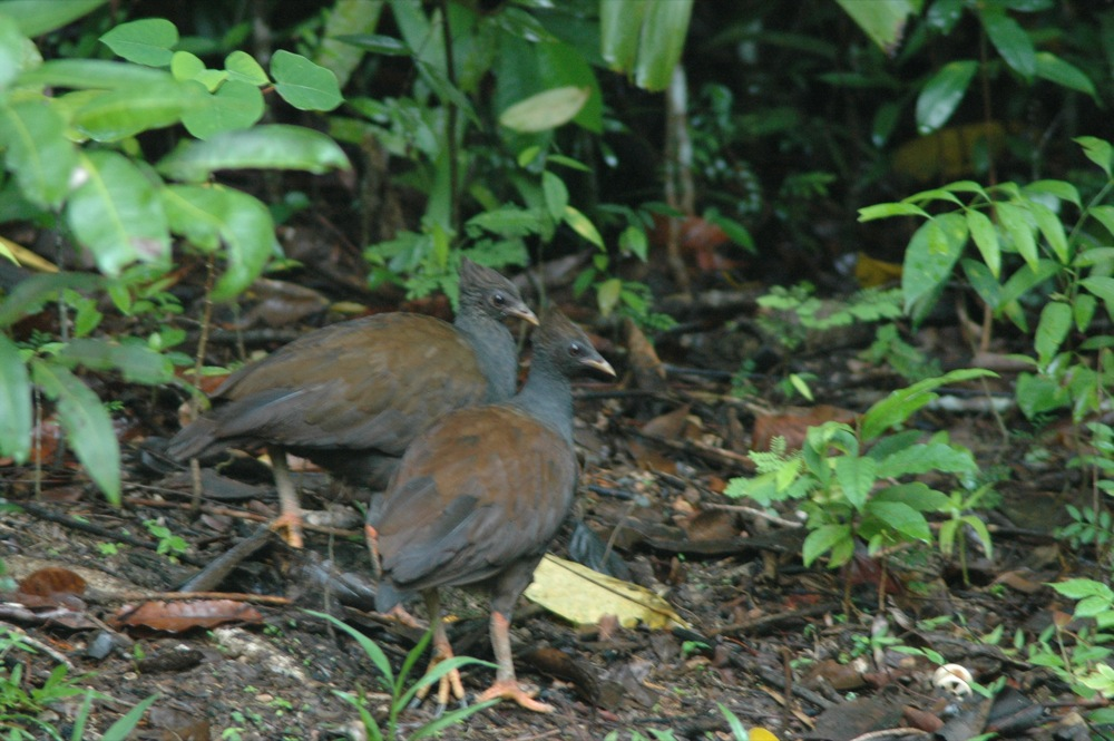 Mégapode de Reinwardt